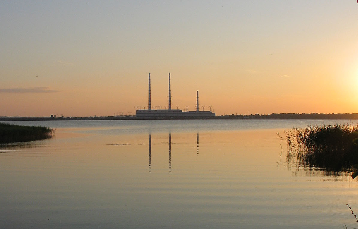 Elektrėnai - See und Kraftwerk.